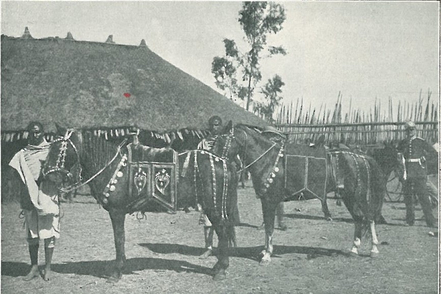 Pferdegeschenke Meneliks II. an Friedrich Rosen und Graf Eulenburg